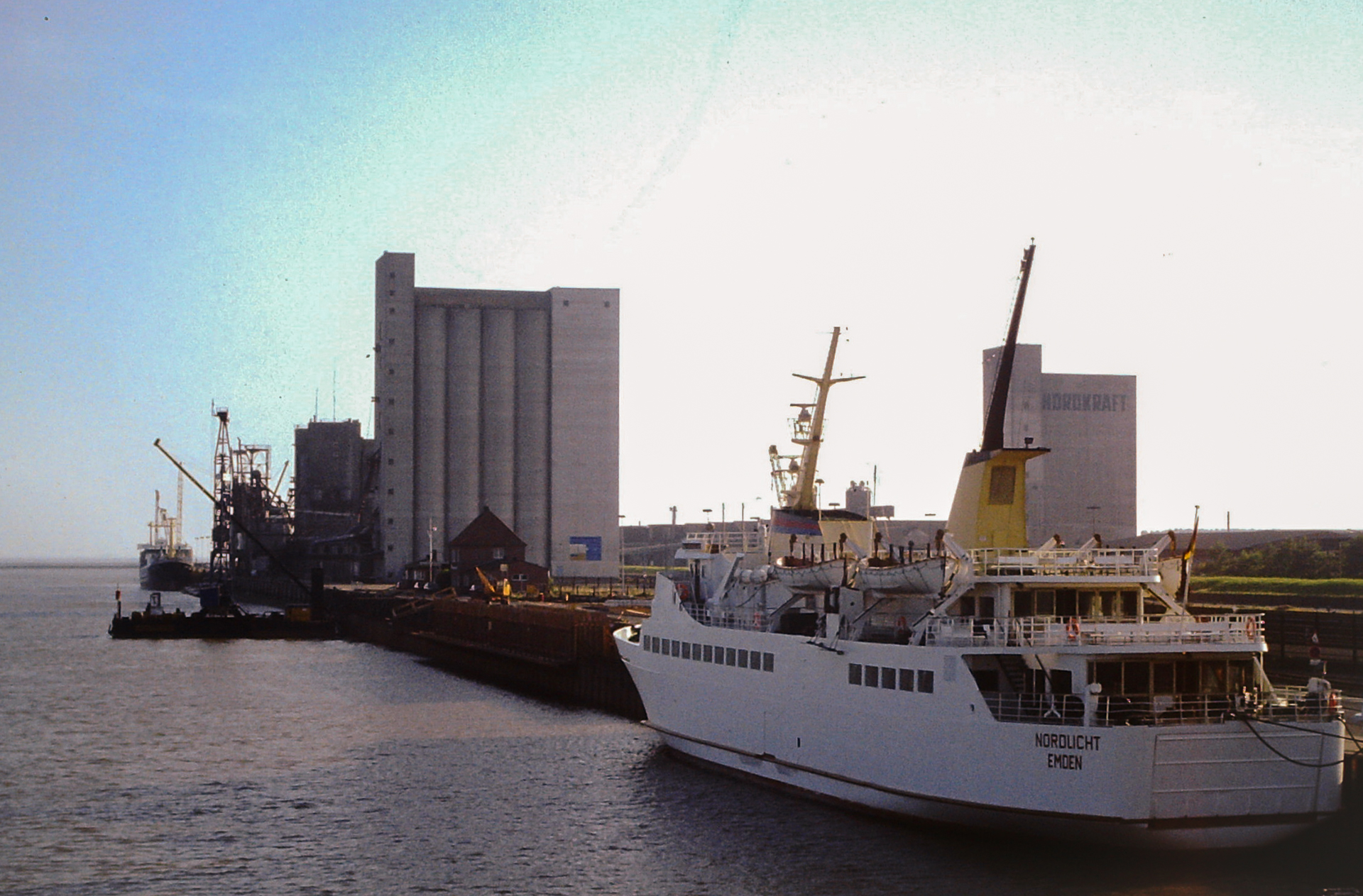 Dieses Diapositiv der MS Nordlicht zeigt das Schiff im Sommer 1984 an der Reede im Emder Außenhafen.